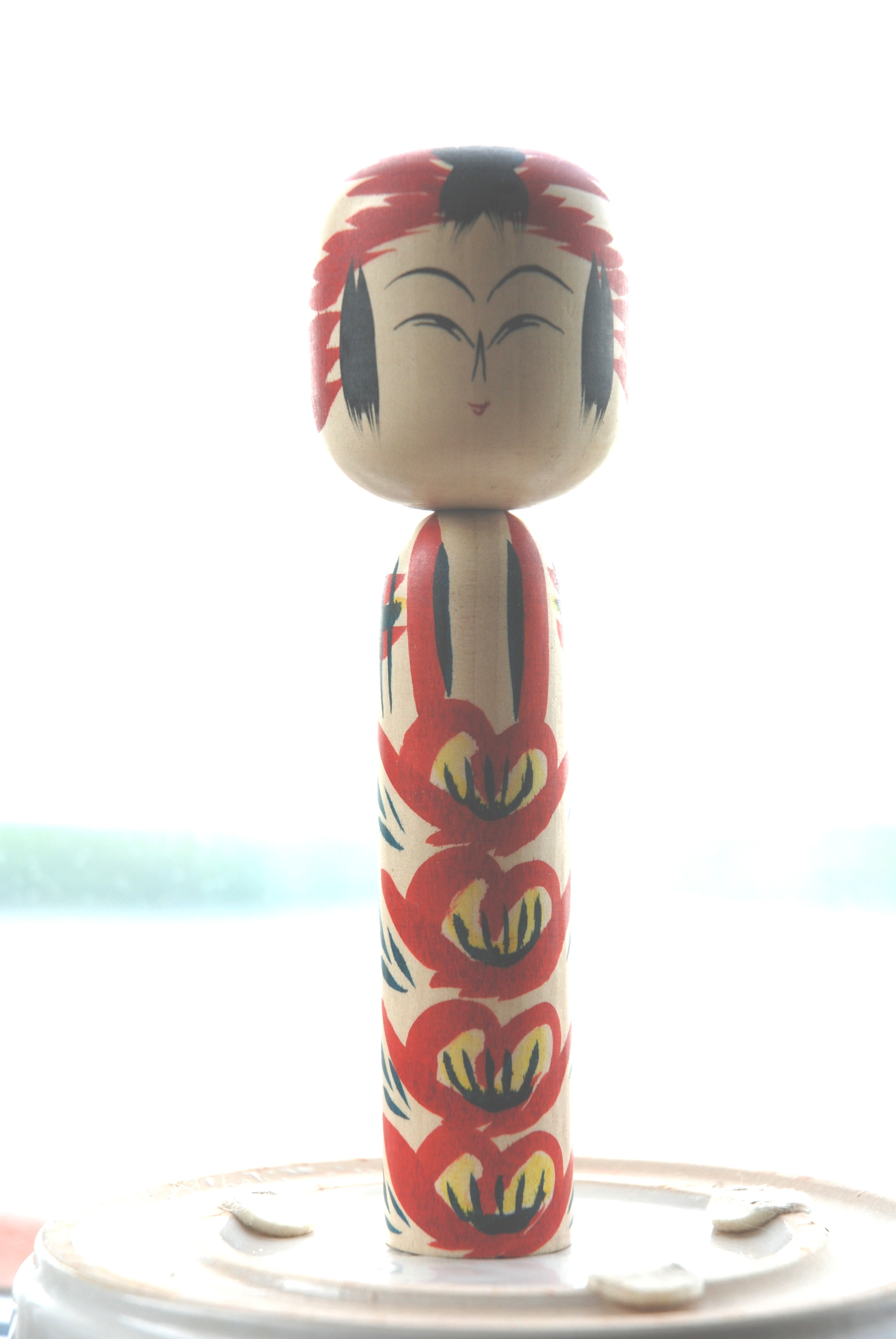 Japanese kokeshi wooden doll